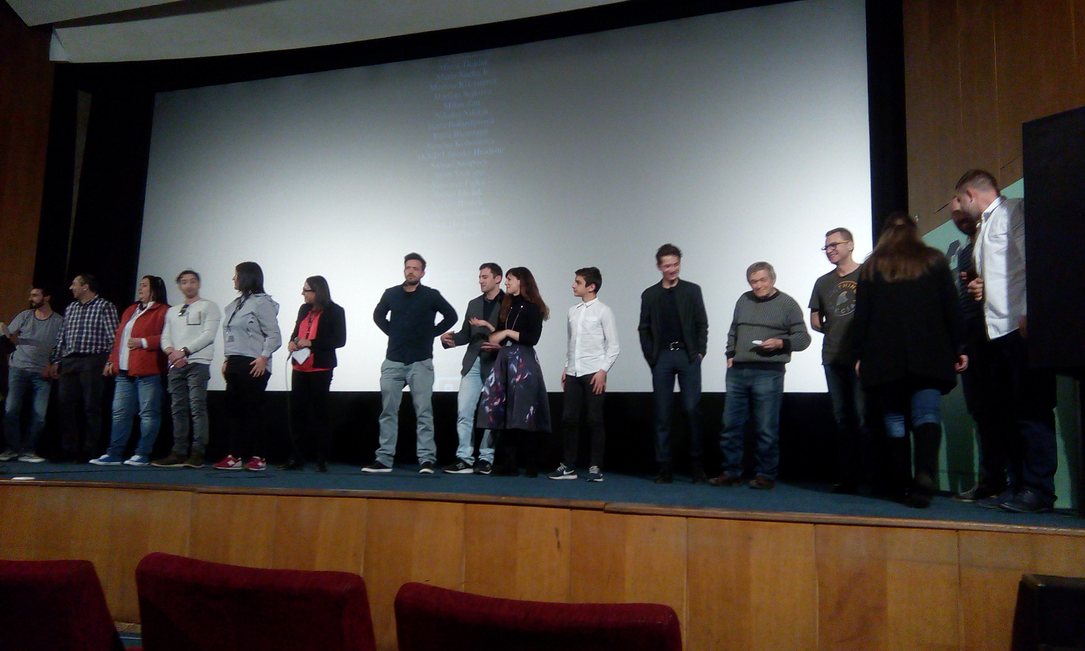 Актьорите от филма Радиограмофон